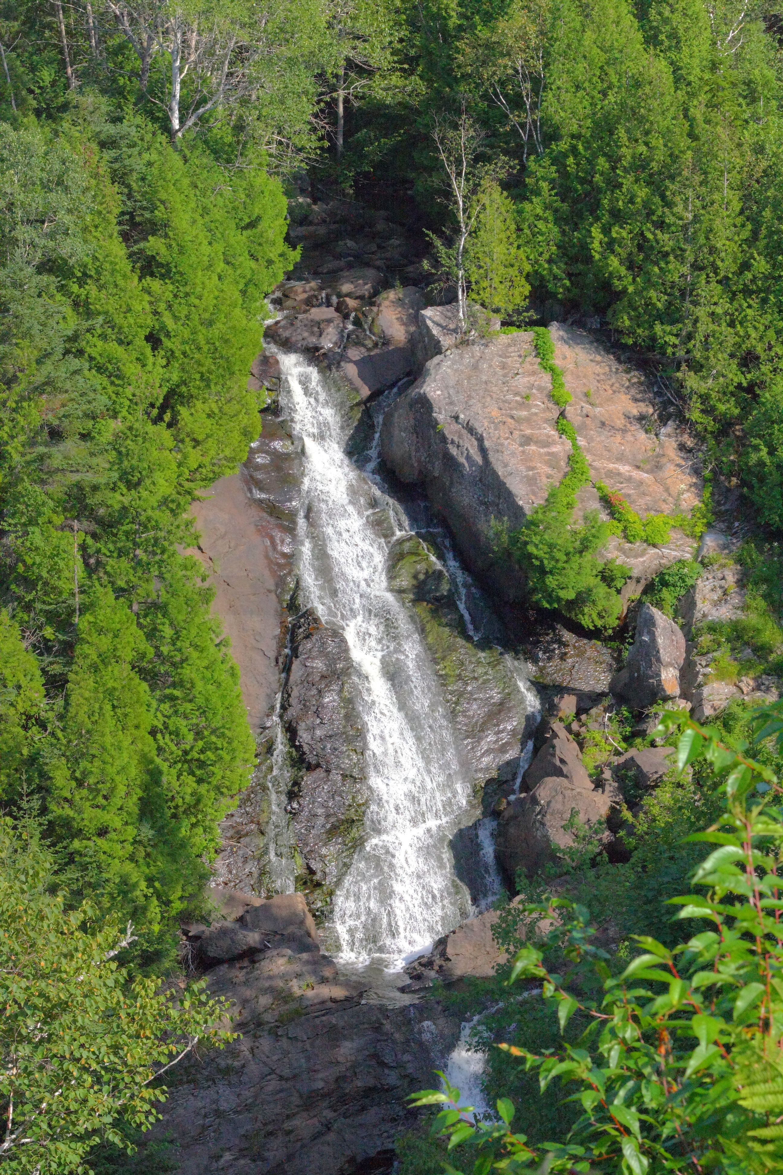 La chute plainasse à Saint-Éloi dans la région des Basques au Québec le 1er août 2010.